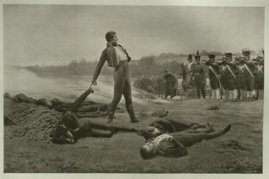 "Heldentod der elf Schillschen Offiziere vor Wesel, 16. September 1809", Heliogravure (ca. 19 x 36cm) nach einem Gemälde von Adolf Hering (1899)